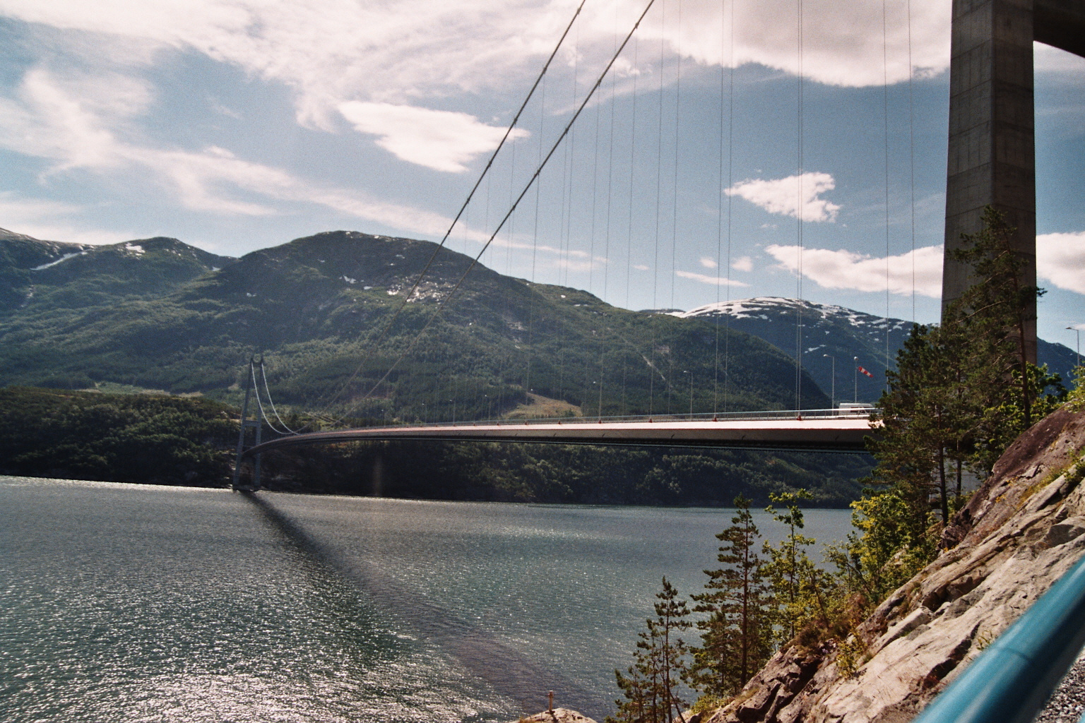 Hardangerbrua